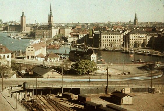 Vy över Slussen och Gamla stan 1928